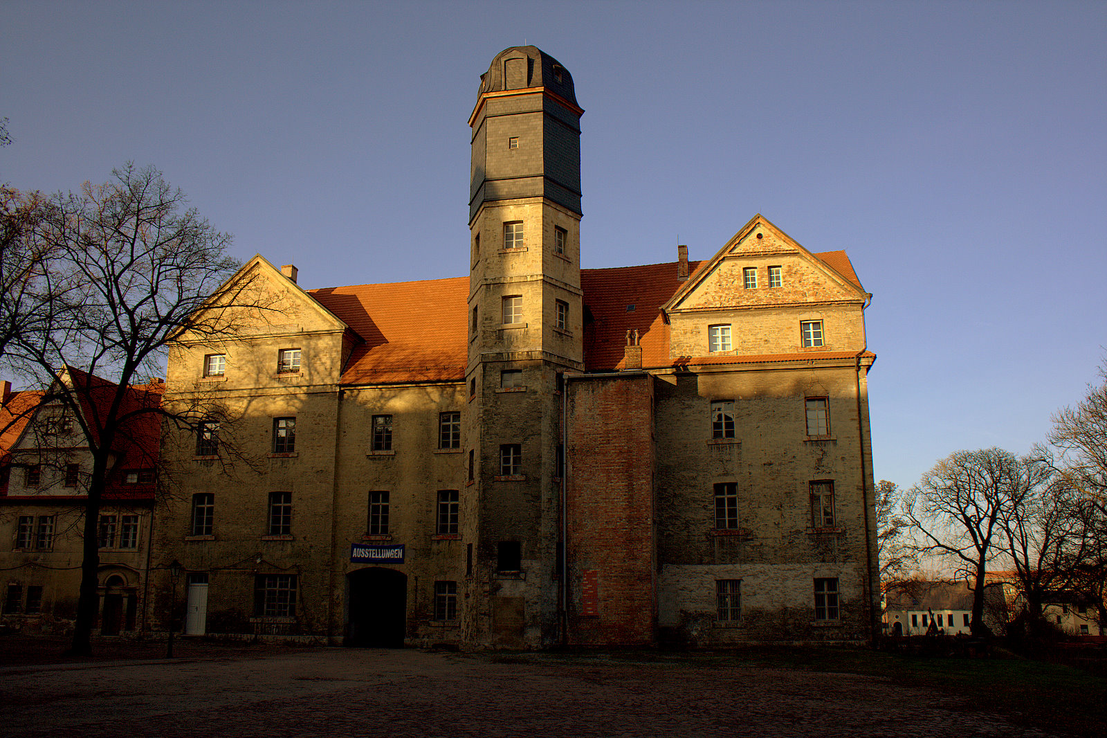 Ferdinandsbau im Köthener Schloss